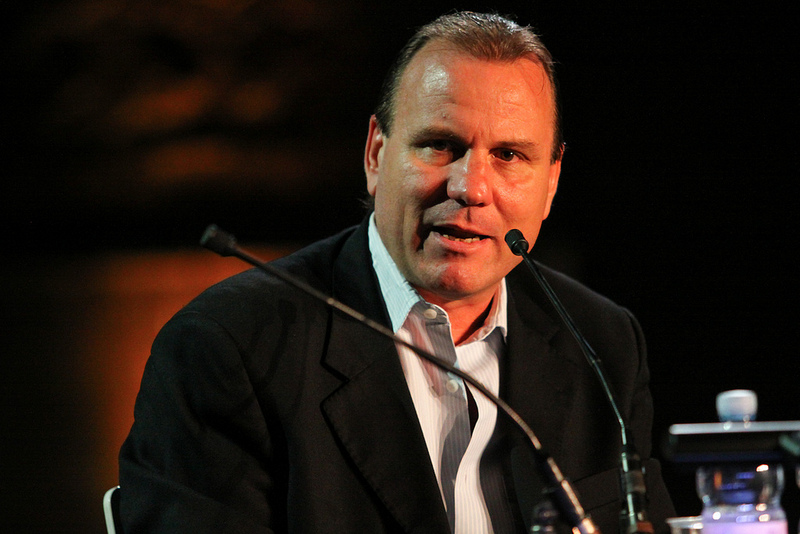 Marco Alloni